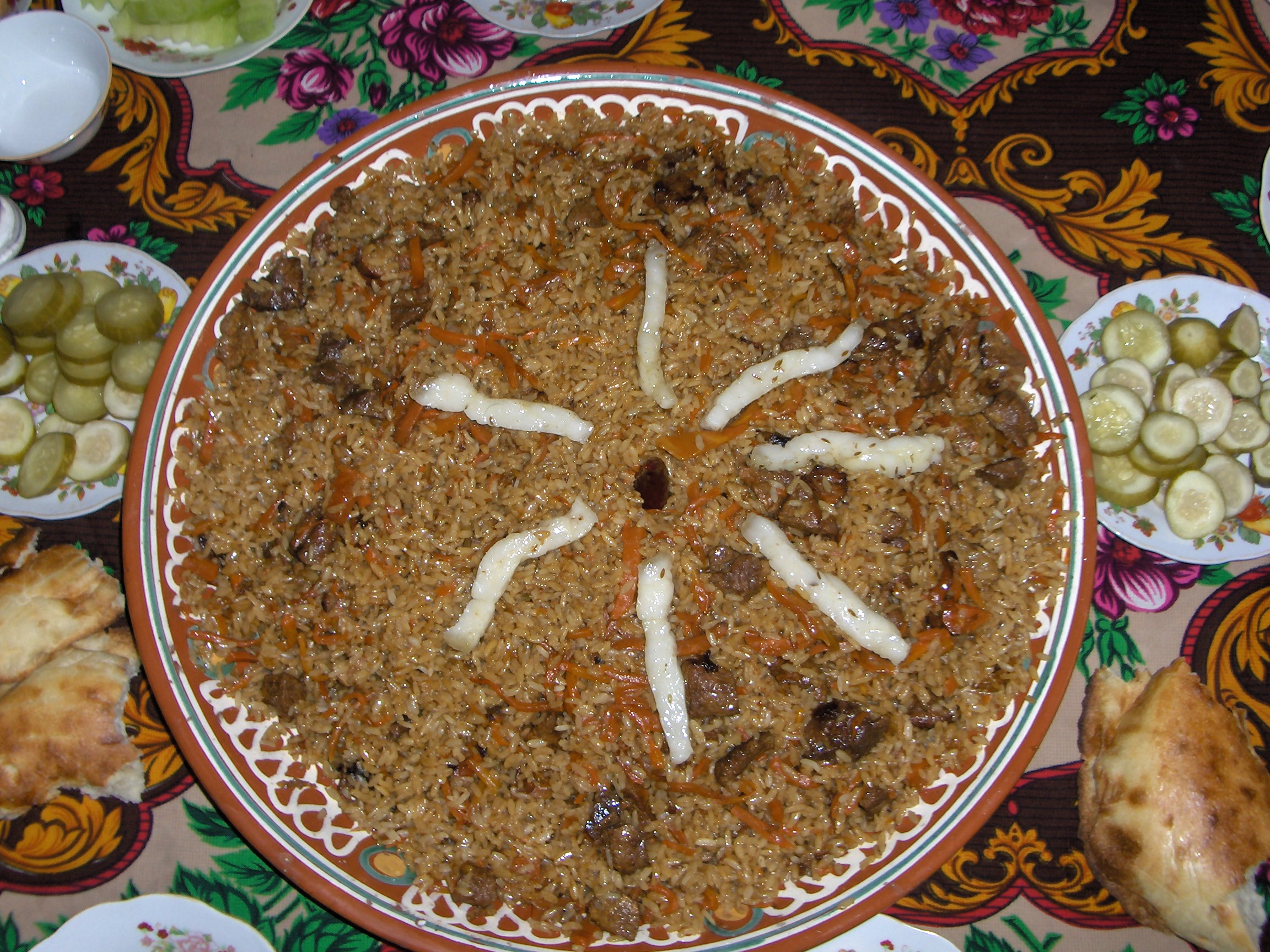 Tajik National meal Oshi Palov (Pilaf)